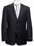 Mr.Boy un The... adlı çizgi roman bölümünde giydiği Takım Elbise